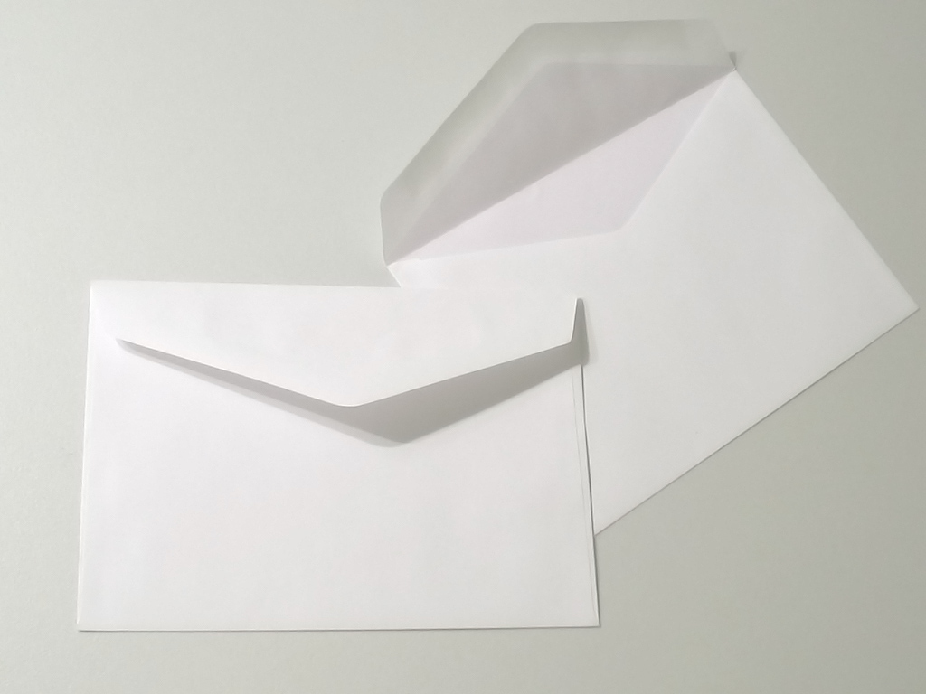 enveloppen